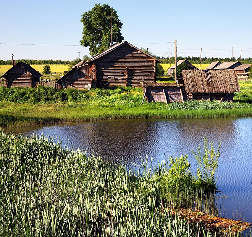 Деревня Южаки